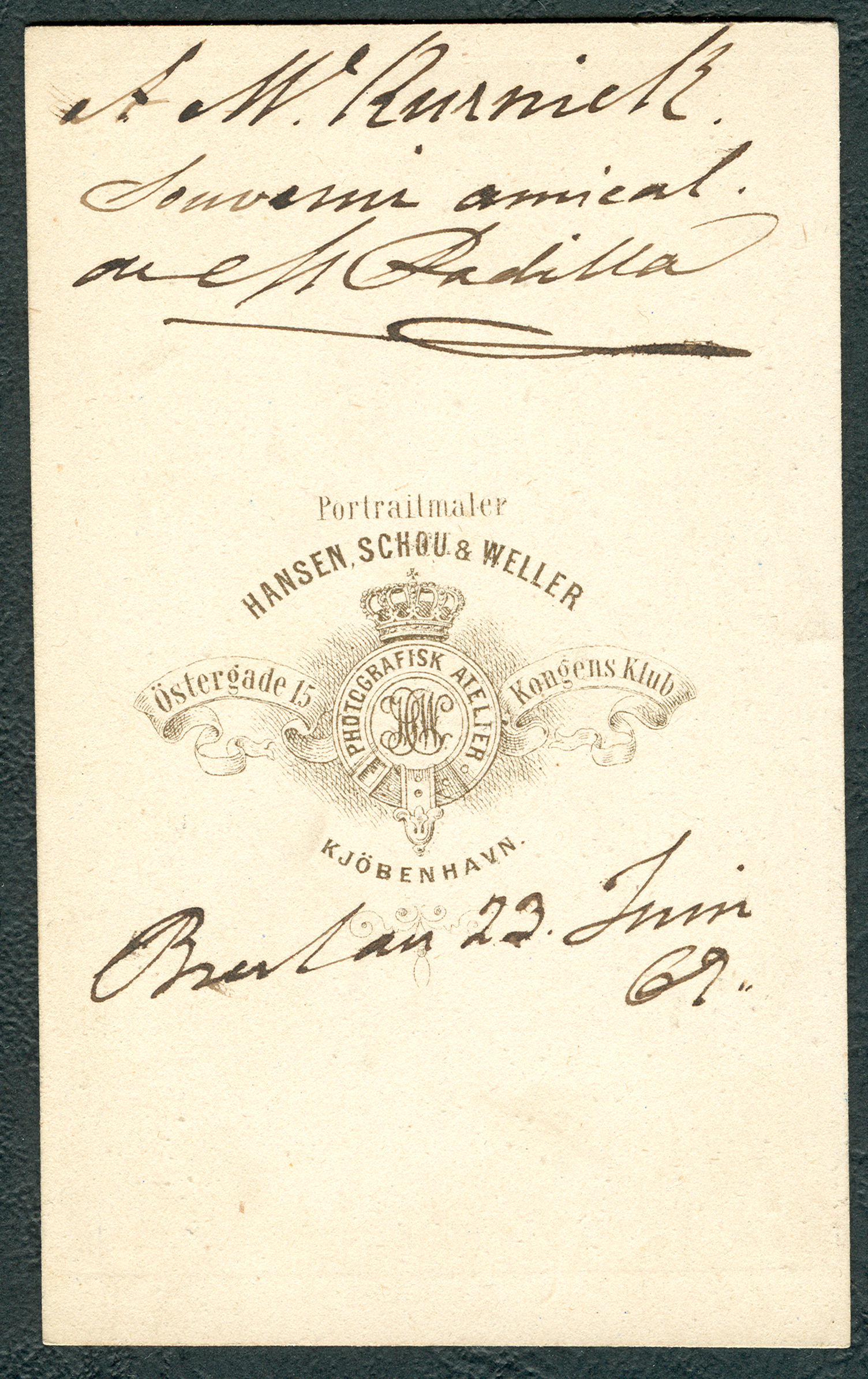 Mariano Padilla, Carte de Visite mit Widmung, wohl für Max Kurnik